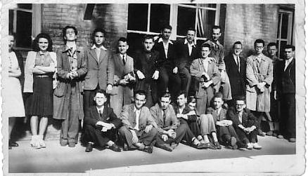 La Taupe du lycée Fermat de Toulouse (circa 1943).